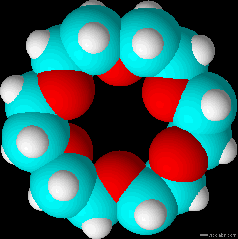 Ether-couronne à 6 oxygènes